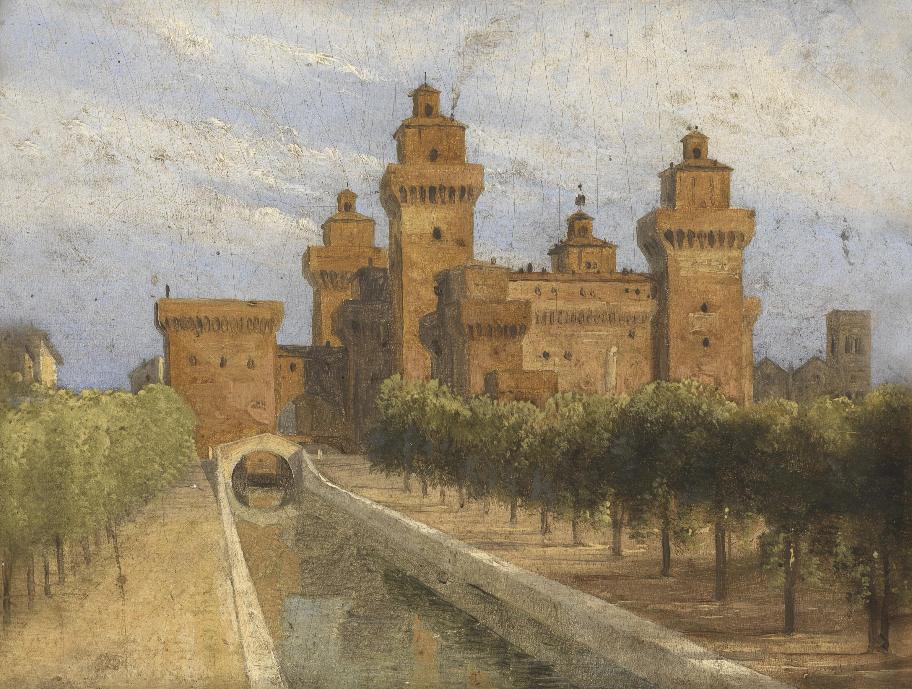 Castello Estense (Ferrara). Öl auf Karton, 14,5 x 18 cm